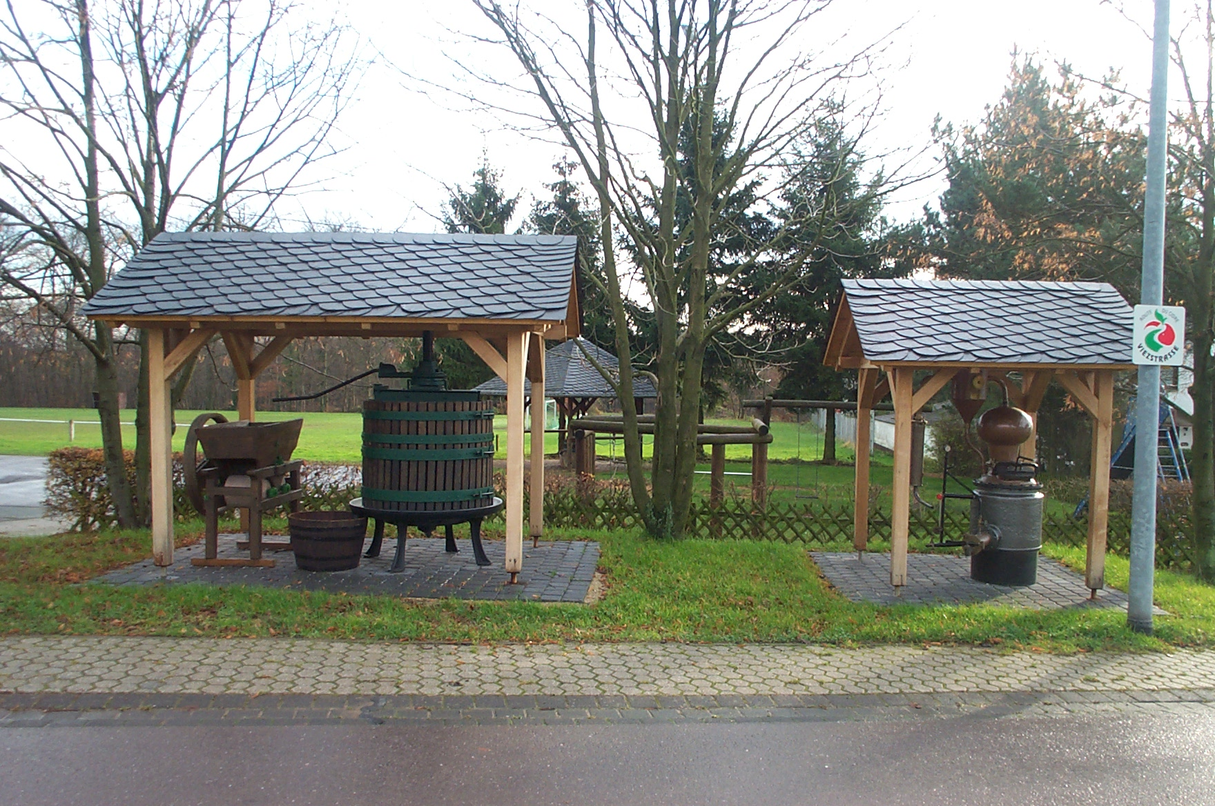 Viezkelterstation an der Viezstraße in Fisch